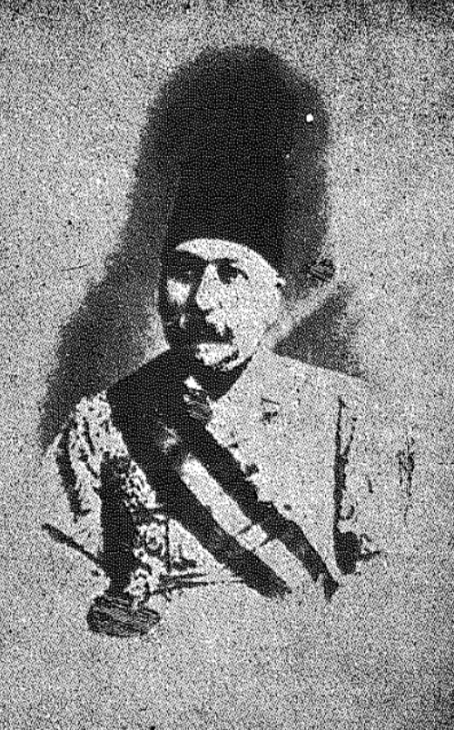 محمدحسن میرزا معتضدالدوله نوه عباس میرزا نایب السلطنه